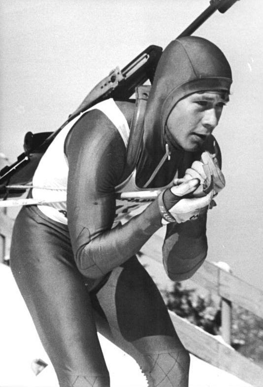 Frank-Peter Roetsch ADN-ZB Schaar 6.3.87-A- Oberhof: 30. Biathlon-DDR-Meisterschaften- Der dreifache Weltmeister Frank-Peter Roetsch, SG Dynamo Zinnwald, wurde überlegen Sieger des 20-Kilometer-Wettbewerbs.